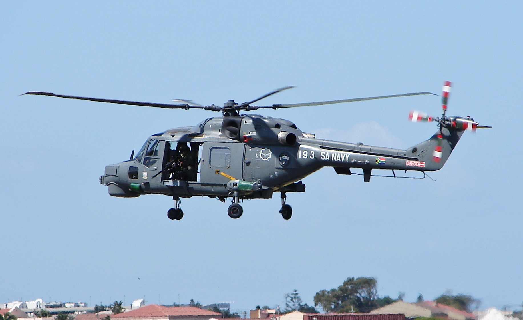 AgustaWestland Super Lynx 300 Mk.64 no. 193 at AAD 2010, AFB Ysterplaat